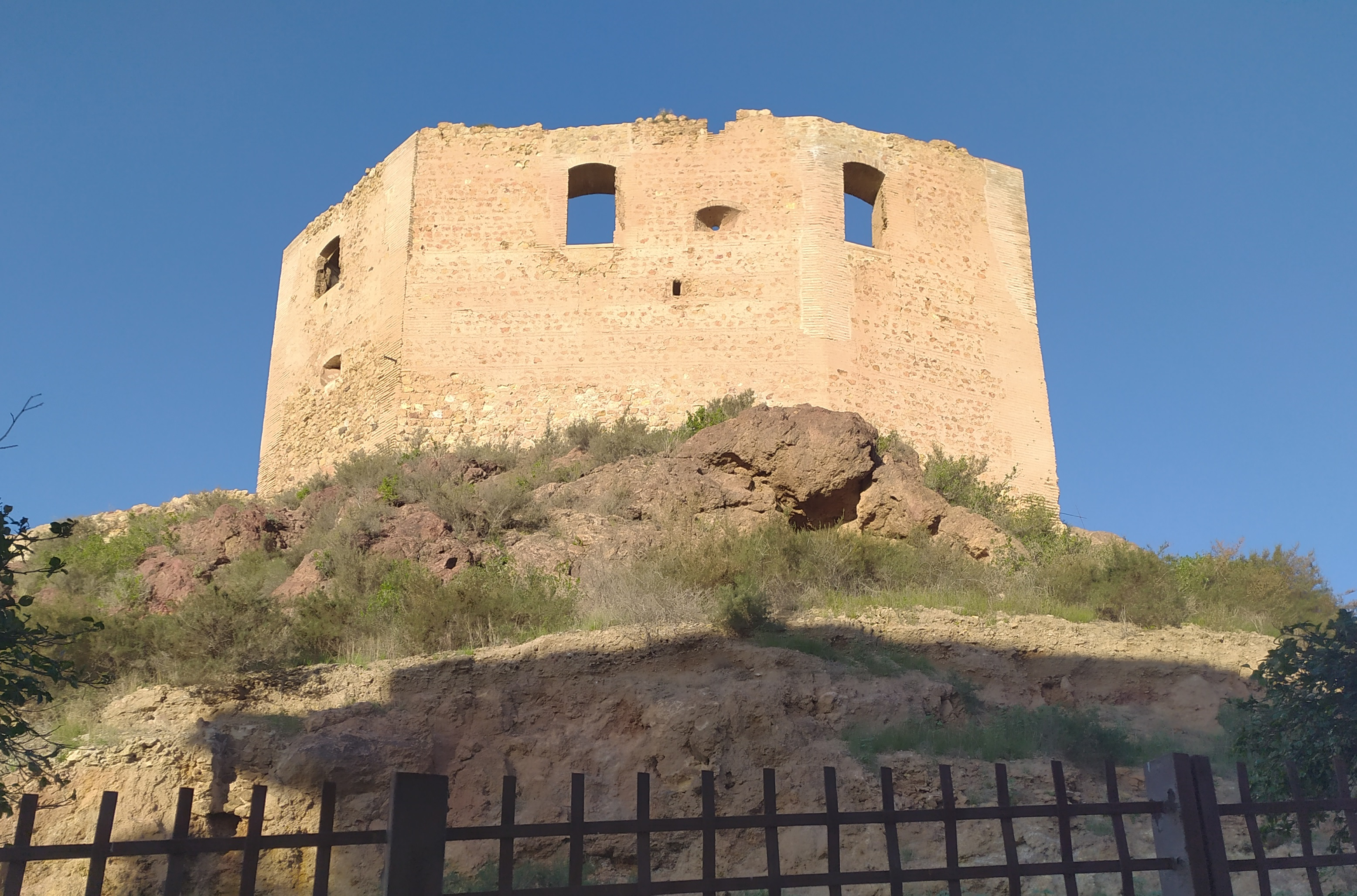 Castillo de los Vélez en Mazarrón (España).